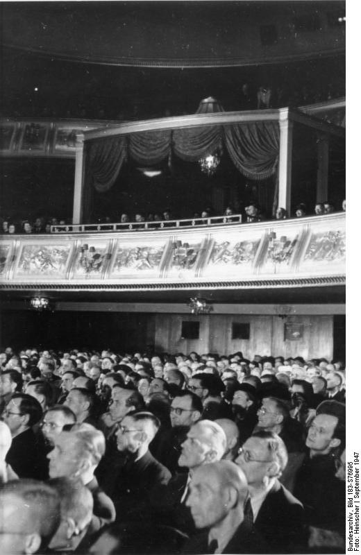 Berlin, 2. CDU-Parteitag, Staatsoper Parteitag der CDU in Berlin Vom 6.-8.September fand in der Staatsoper der 2. Parteitag der CDU Berlins und der Ostzone statt. UBz: Blick in den Zuschauerraum der Staatsoper, in der Mittelloge die Vertreter der Besatzungsmächte. Aufn.: Heinscher-Illus 8.9.47 830-47